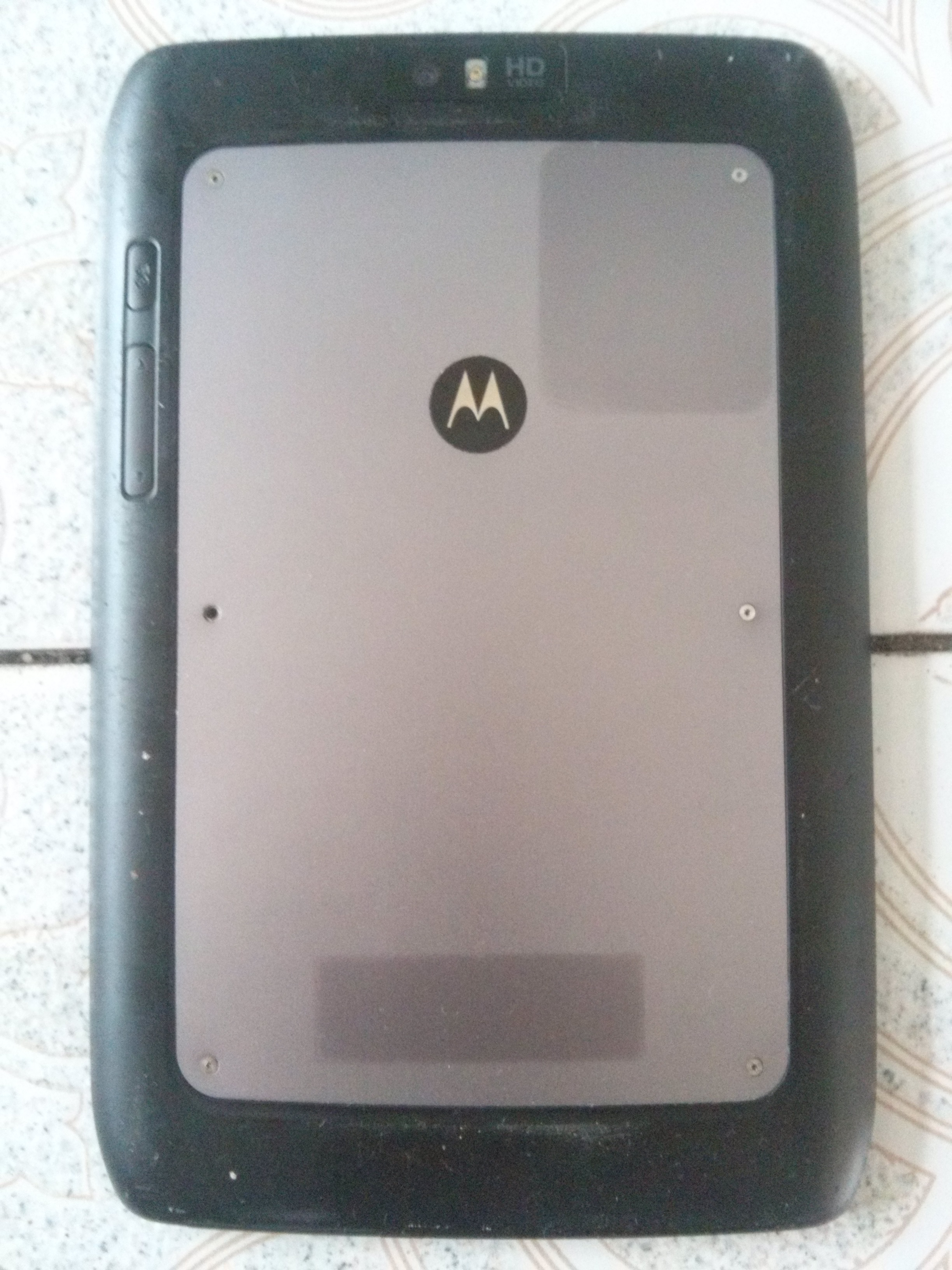 tablet